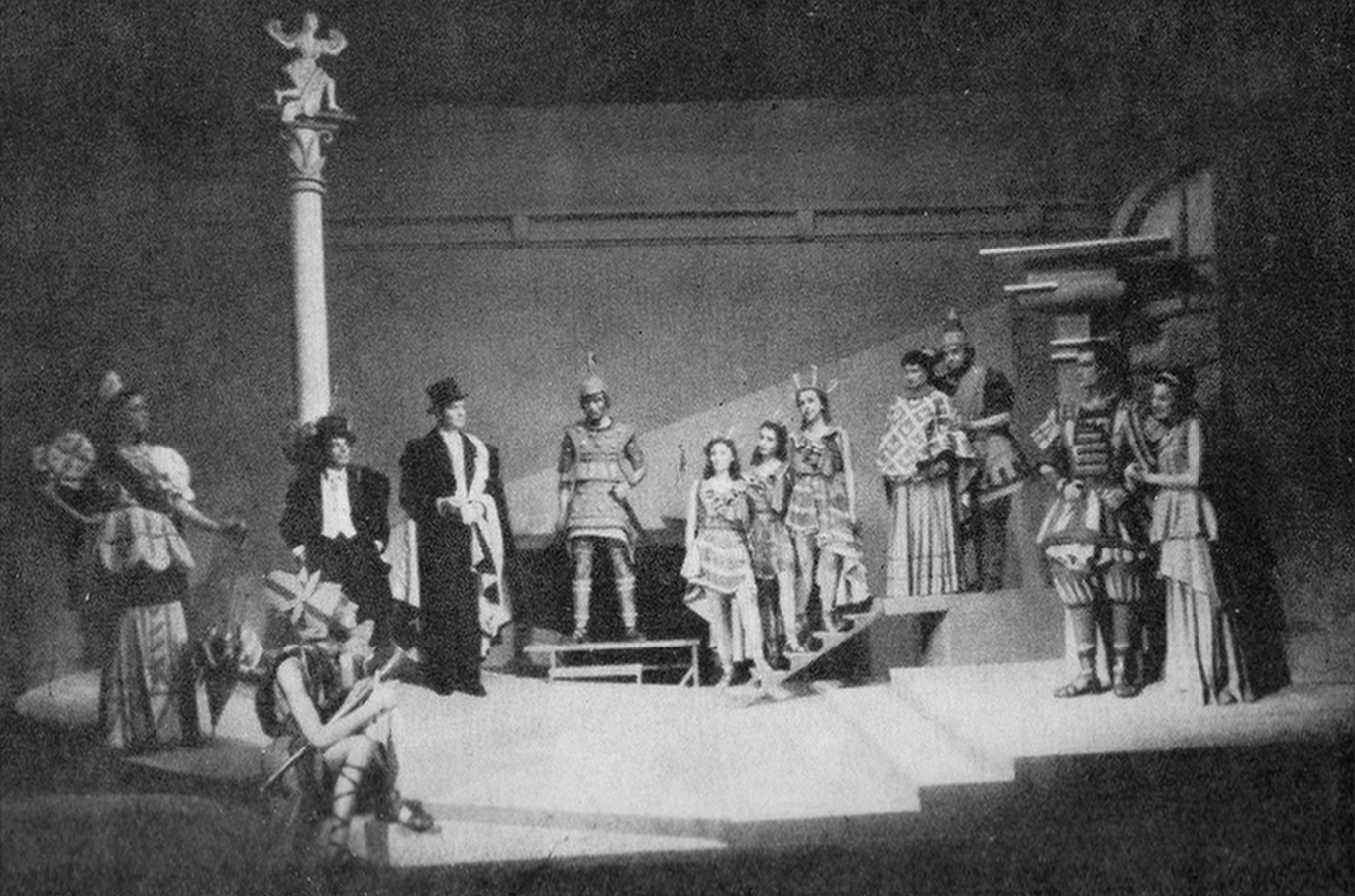 Pokaz Amfitriona 38 w Starym Teatrze w Karkowie - 1948.